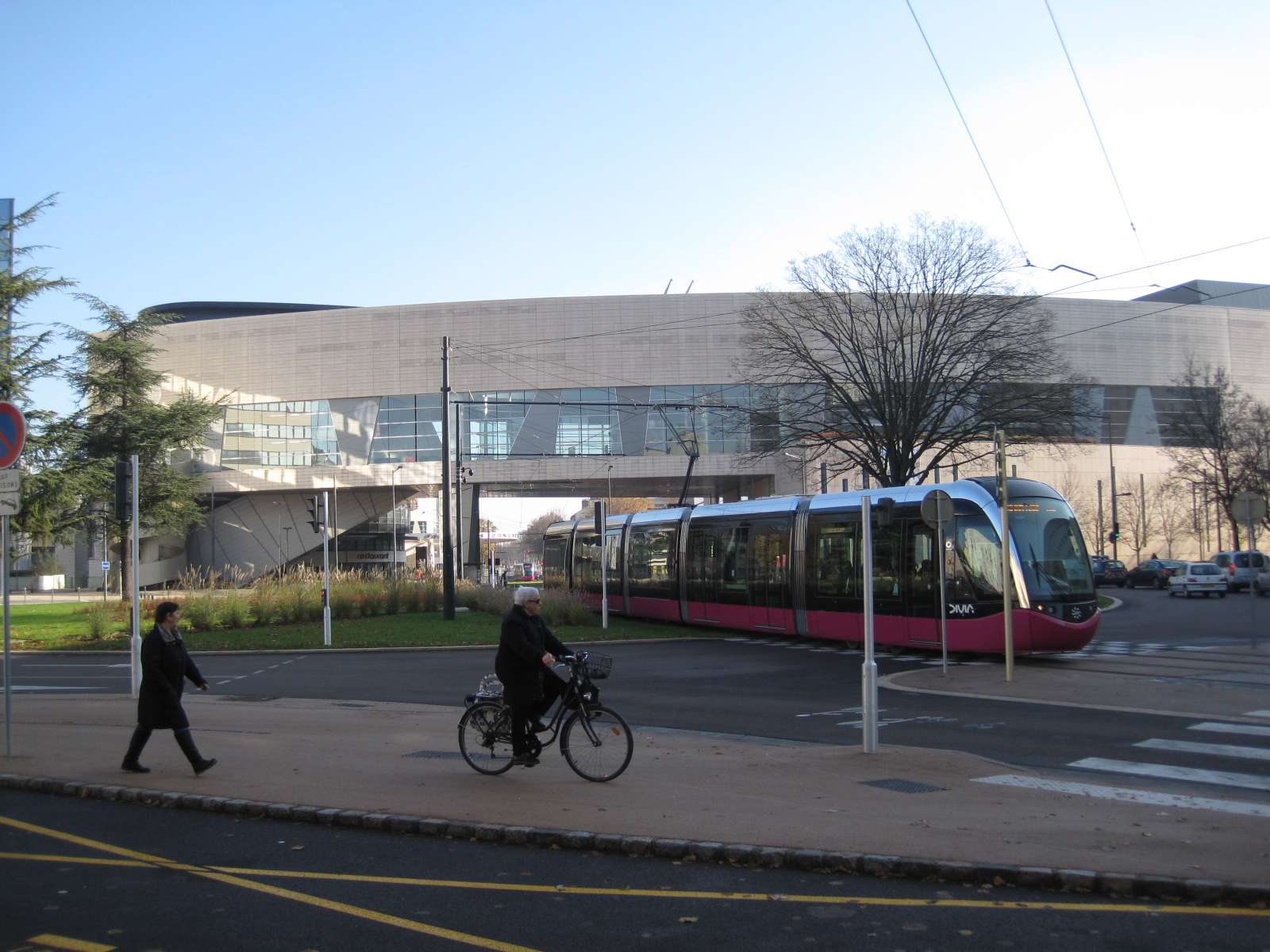 Auditorium & Tramway de Dijon